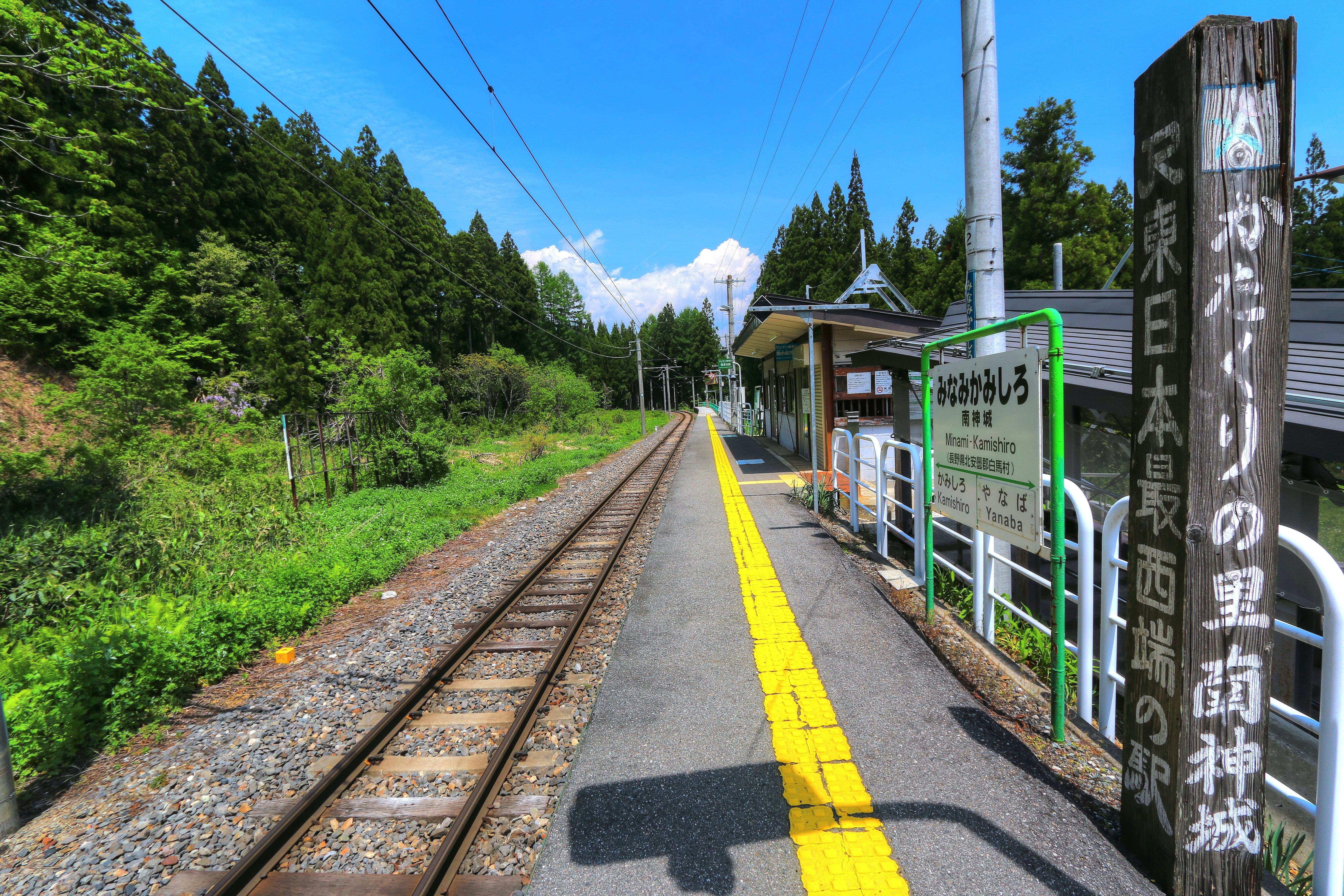 長野県北安曇郡白馬村、南神城駅、大糸線